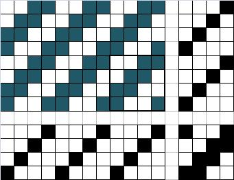 Toimse kanga rakendus